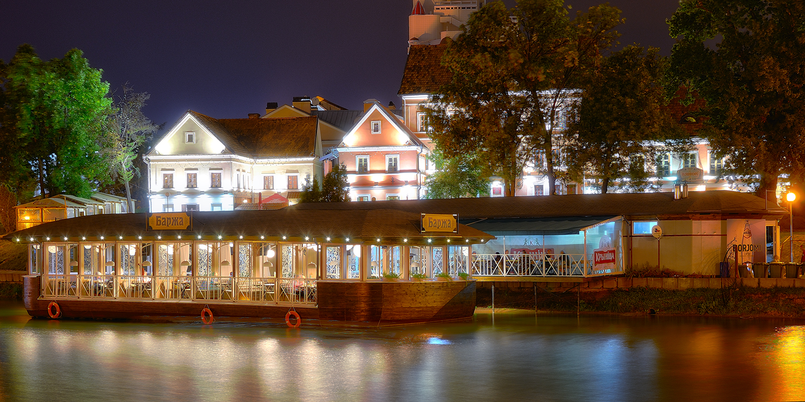 Беларуская (тарашкевіца): Гістарычны цэнтар г. Менску: будынкі і збудаваньні, пляніровачная структура, ляндшафт і культурны пласт. г. Менск This is a photo of Belarusian heritage monument. Reference number: 711Е000001 ( WLM)